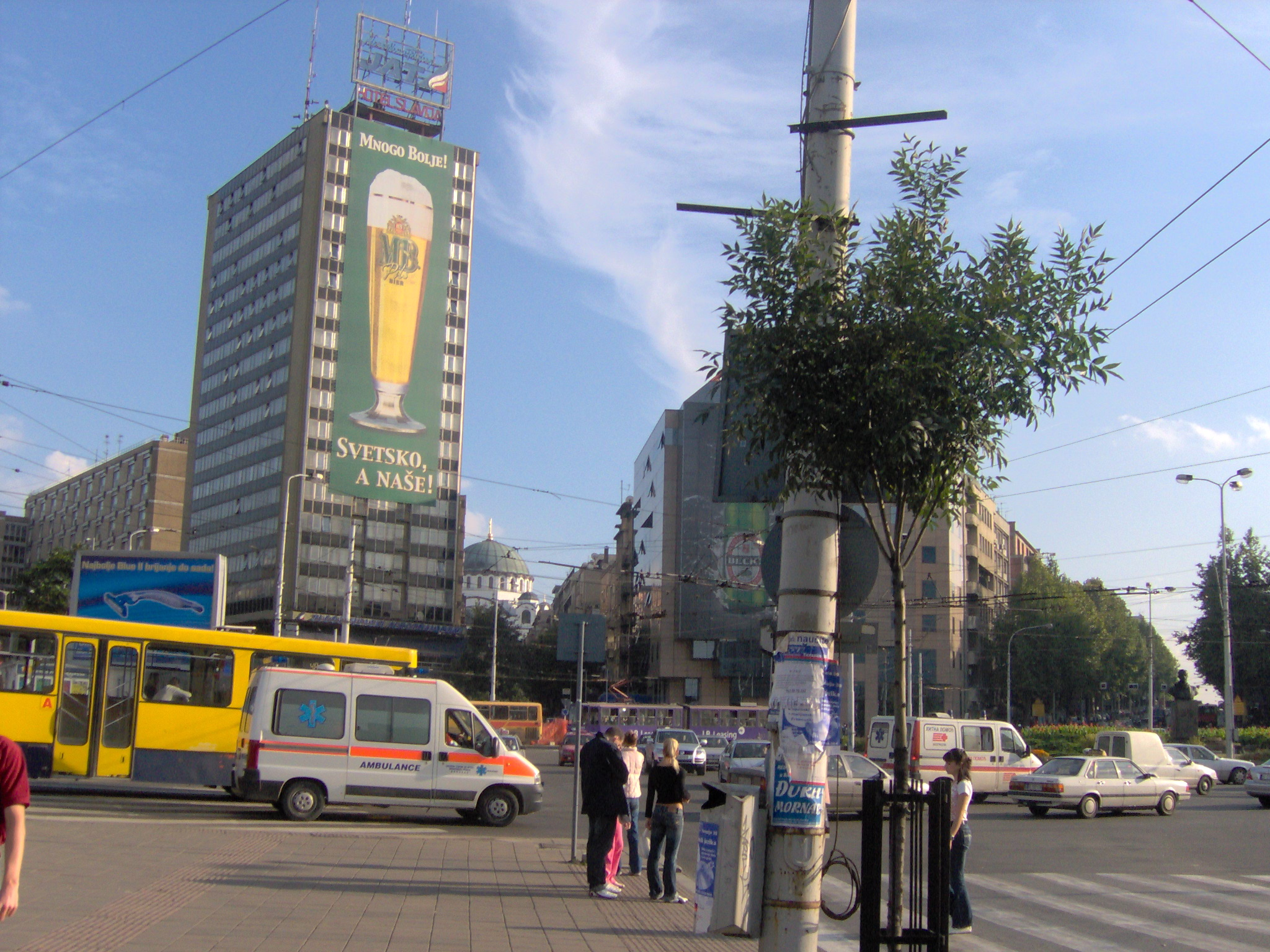 La place Slavija est une place située au centre de Belgrade